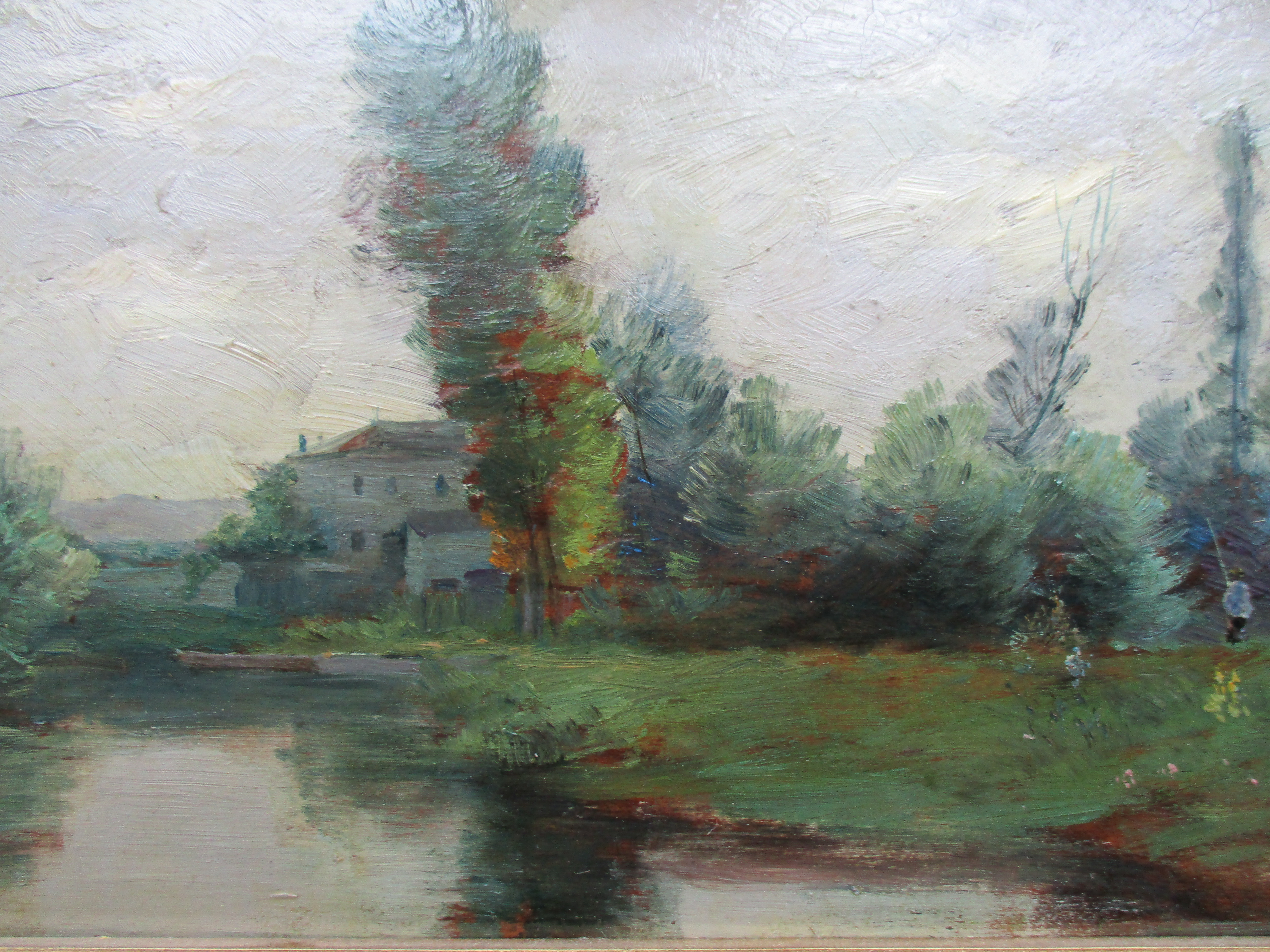 Paysage d'Alfred Melot